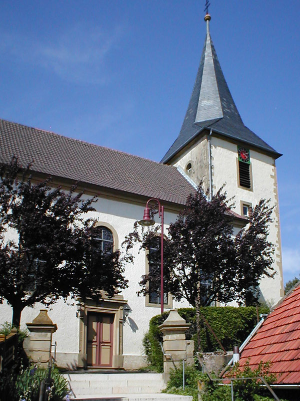 Evang. Kirche in Sinsheim-Adersbach